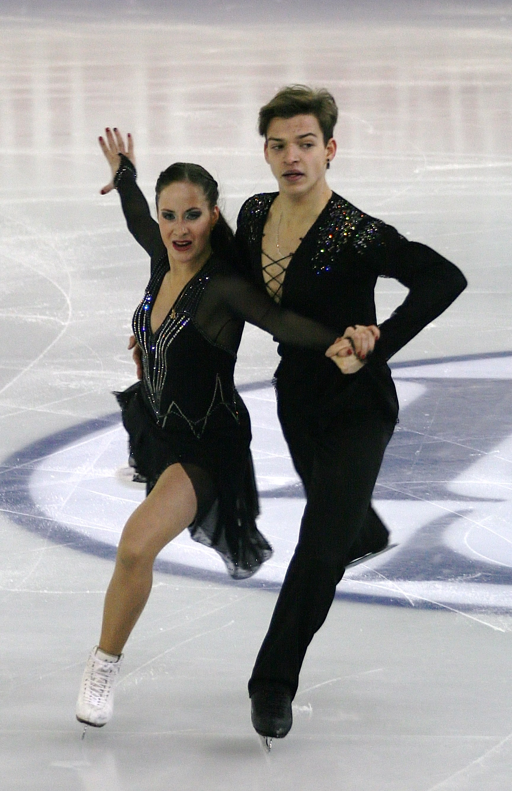 Дарья Морозова и Михаил Жирнов (Россия) на финале Гран-при среди юниоров 2014-2015.